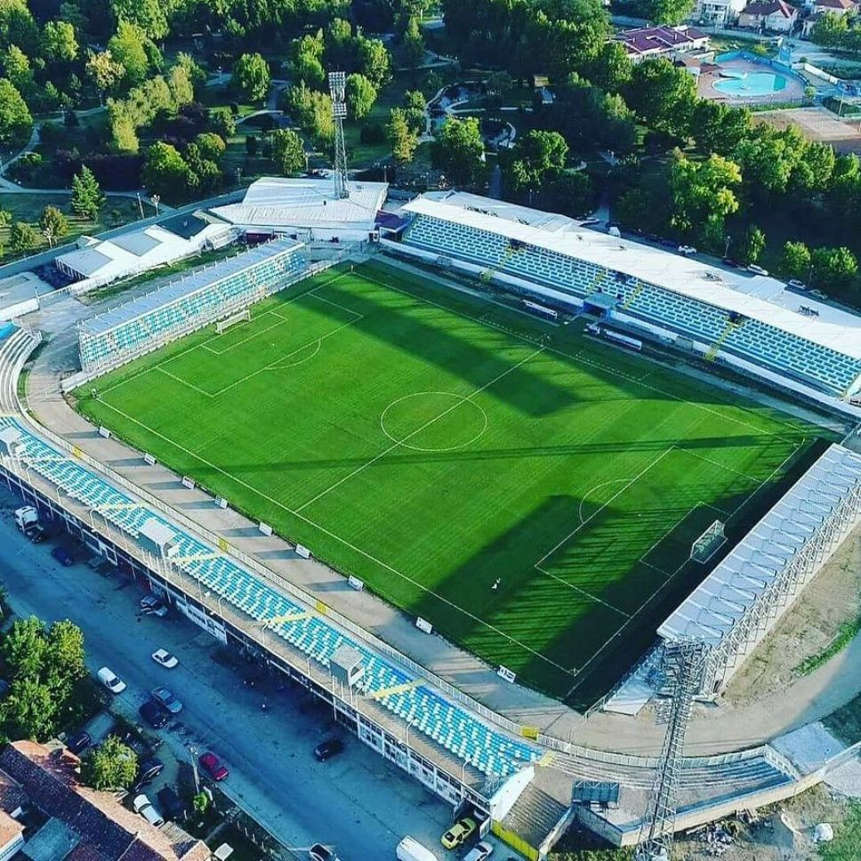 Слика од стадионот Младост во Струмица направена од воздух со помош на дрон